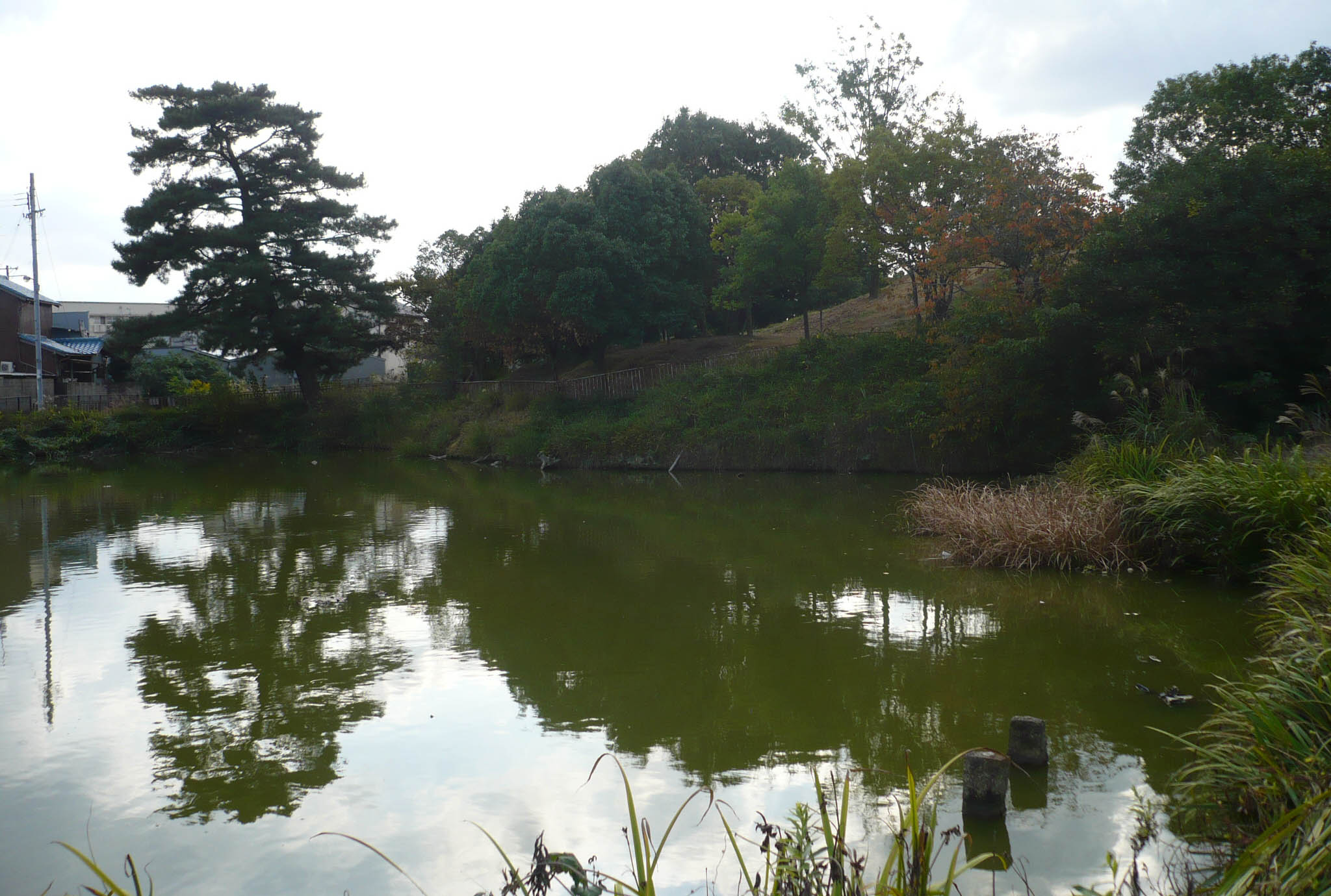 貝吹山古墳の堀